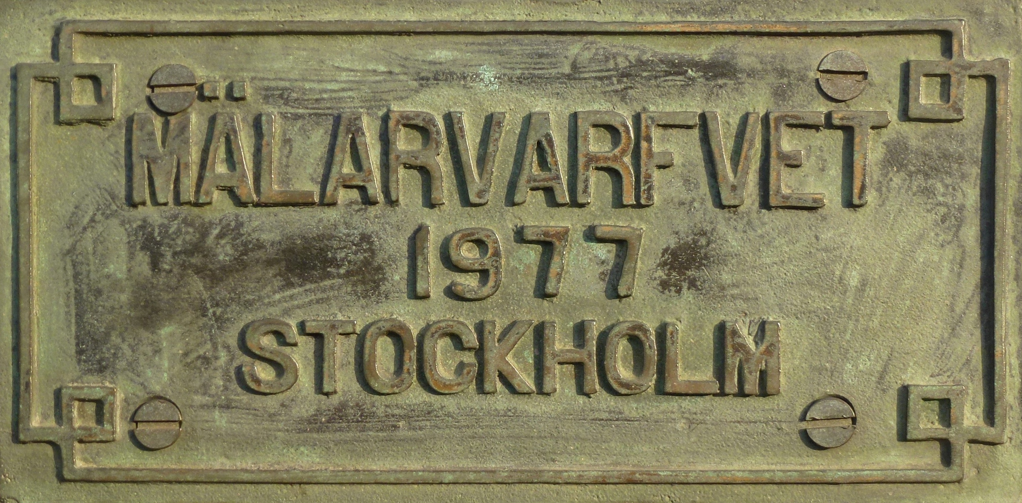 Djurgårdsbron Mälarvarfvets skylt